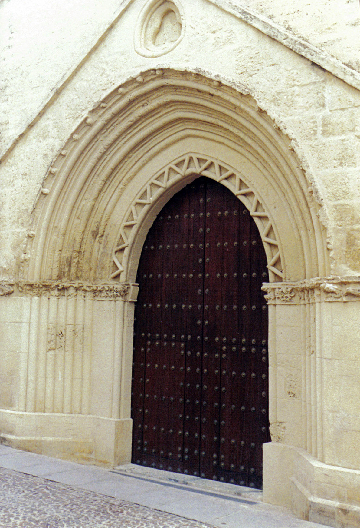 Église mudéjare de la Magdalena à Cordoue (style "gothico-mudéjar de la pierre")